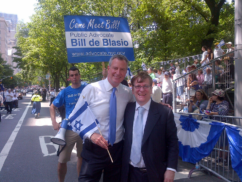 Manhattan, NY | 6.2.13